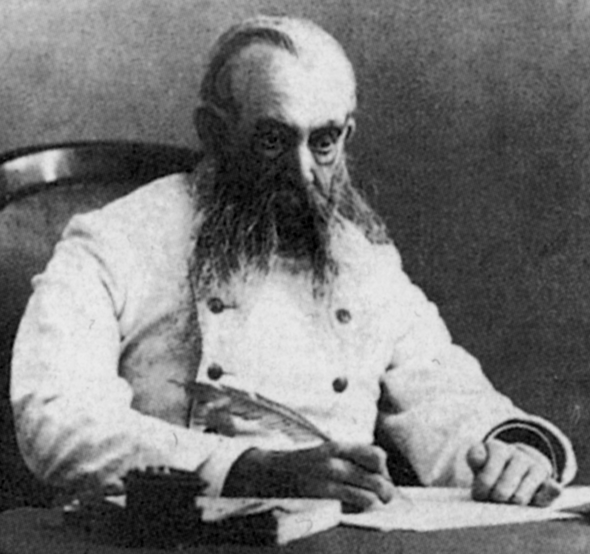 The Russian actor and director Constantin Stanislavski (Константин Сергеевич Станиславский) as General Krutitski in a production of Ostrovsky's (Александр Николаевич Островский) Enough Stupidity in Every Wise Man (На всякого мудреца довольно простоты) in 1910.